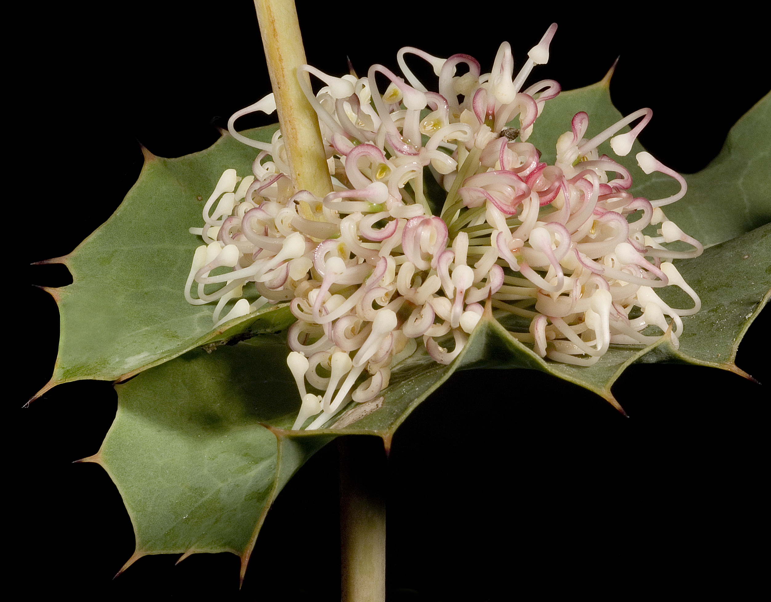 KRT3338